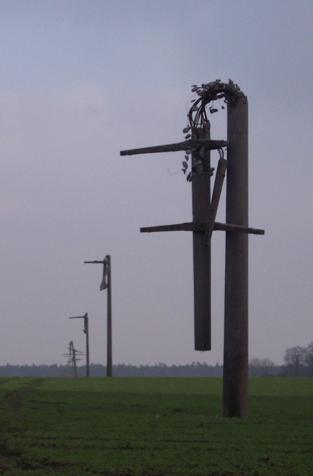 Ahaus, Reste des Münsterländer Schneechaos (abgeknickte Masten einer Mittelspannungsleitung)